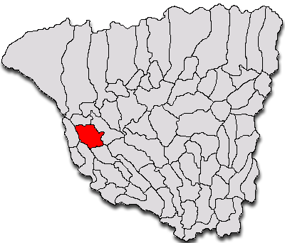 Categorie:Hărţi ale judeţului Gorj